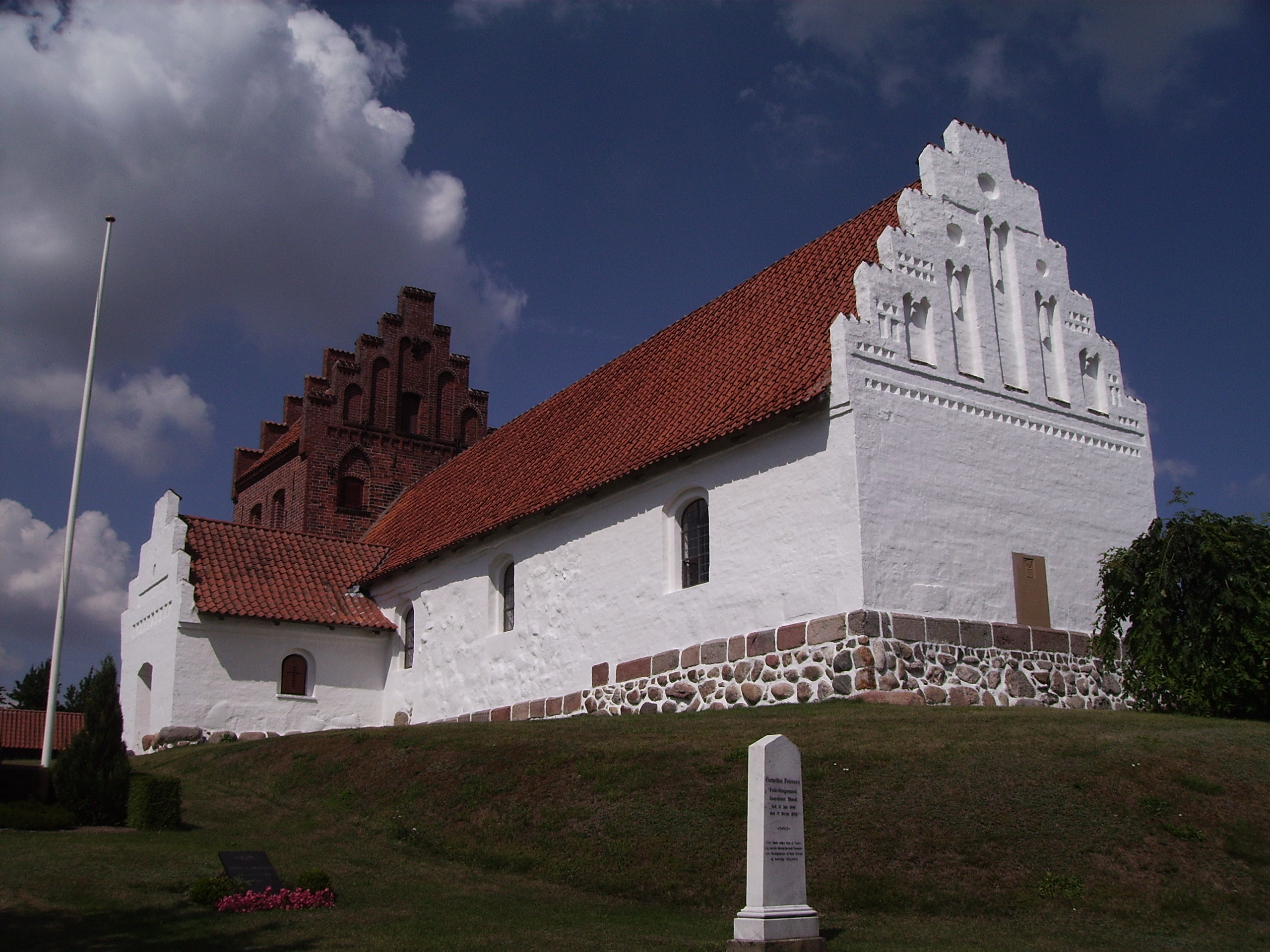 Davinde Kirke, Davinde Sogn, Åsum Herred, Odense Amt, Denmark (Danish Church) - Davinde Kirke fra sydøst